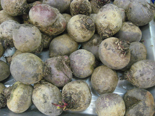 Beterraba